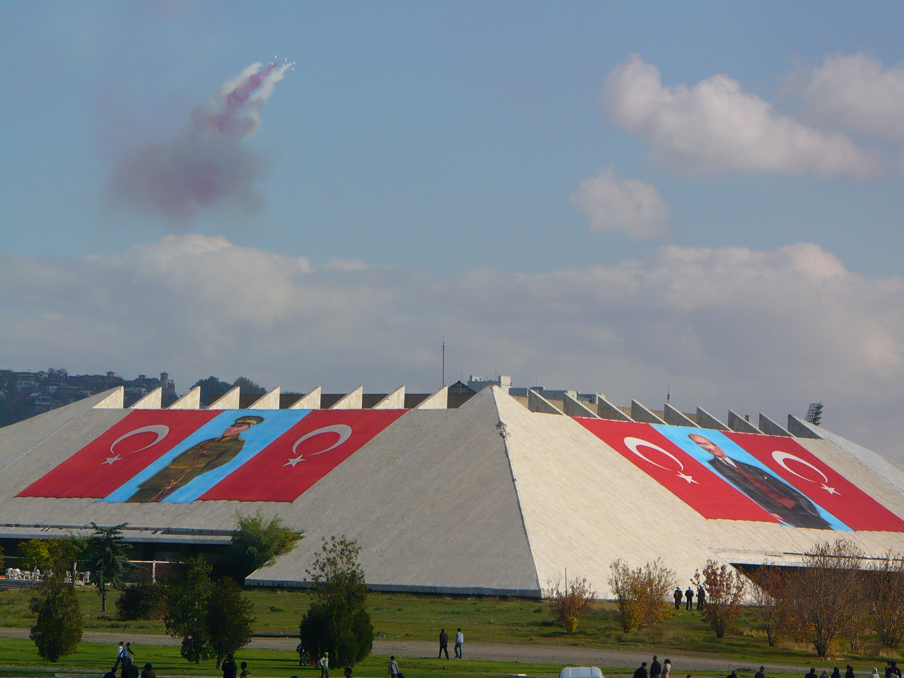 Ankara Atatürk Kültür Merkezi